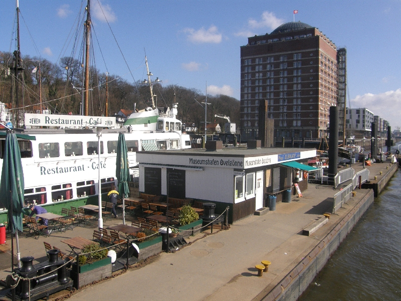 Bilder aus Hamburg. Museumshafen Övelgönne mit dem Seniorenstift Augustinum Hamburg im Hintergrund